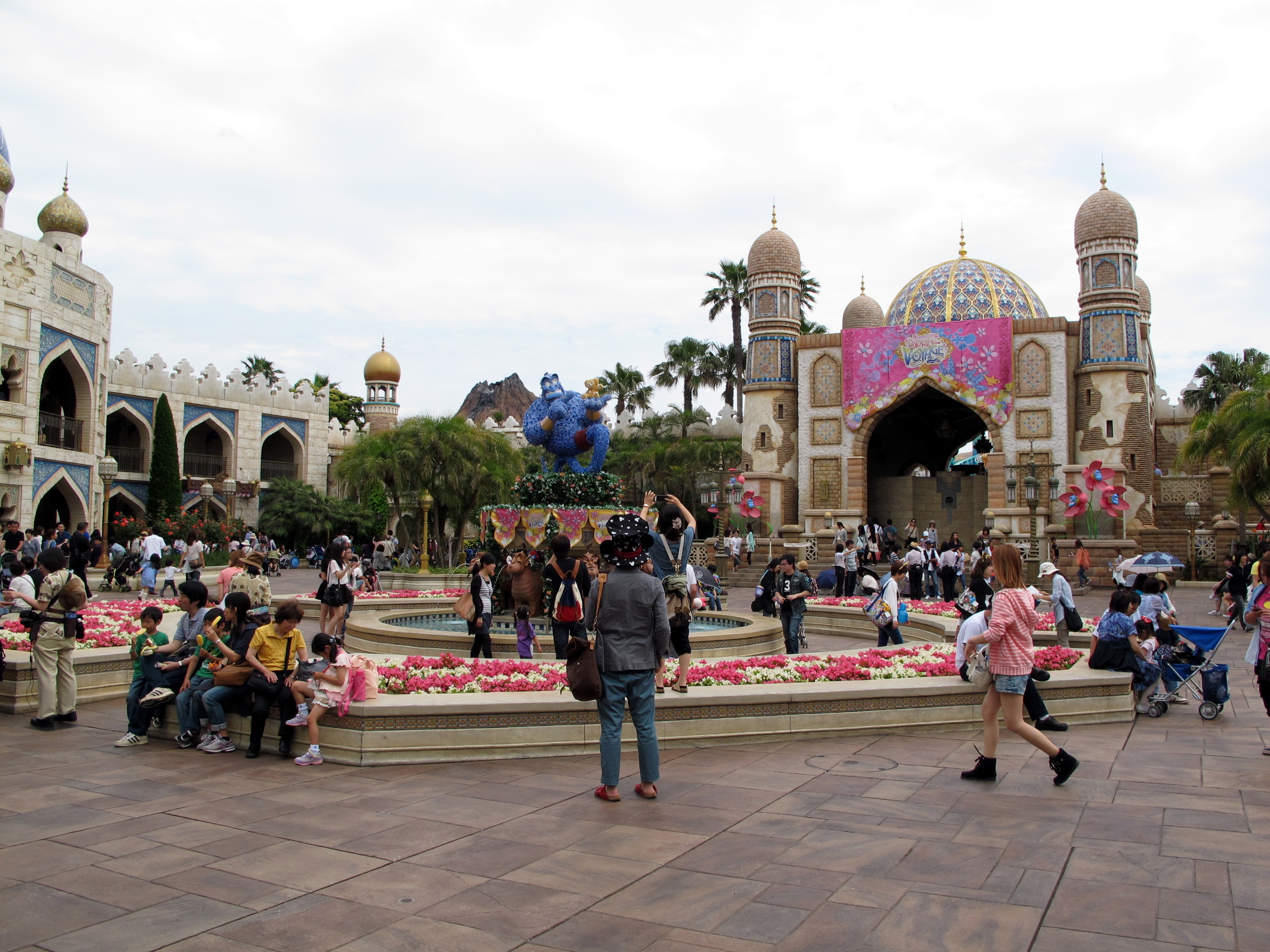 Tokyo DisneySea Arabian Coast